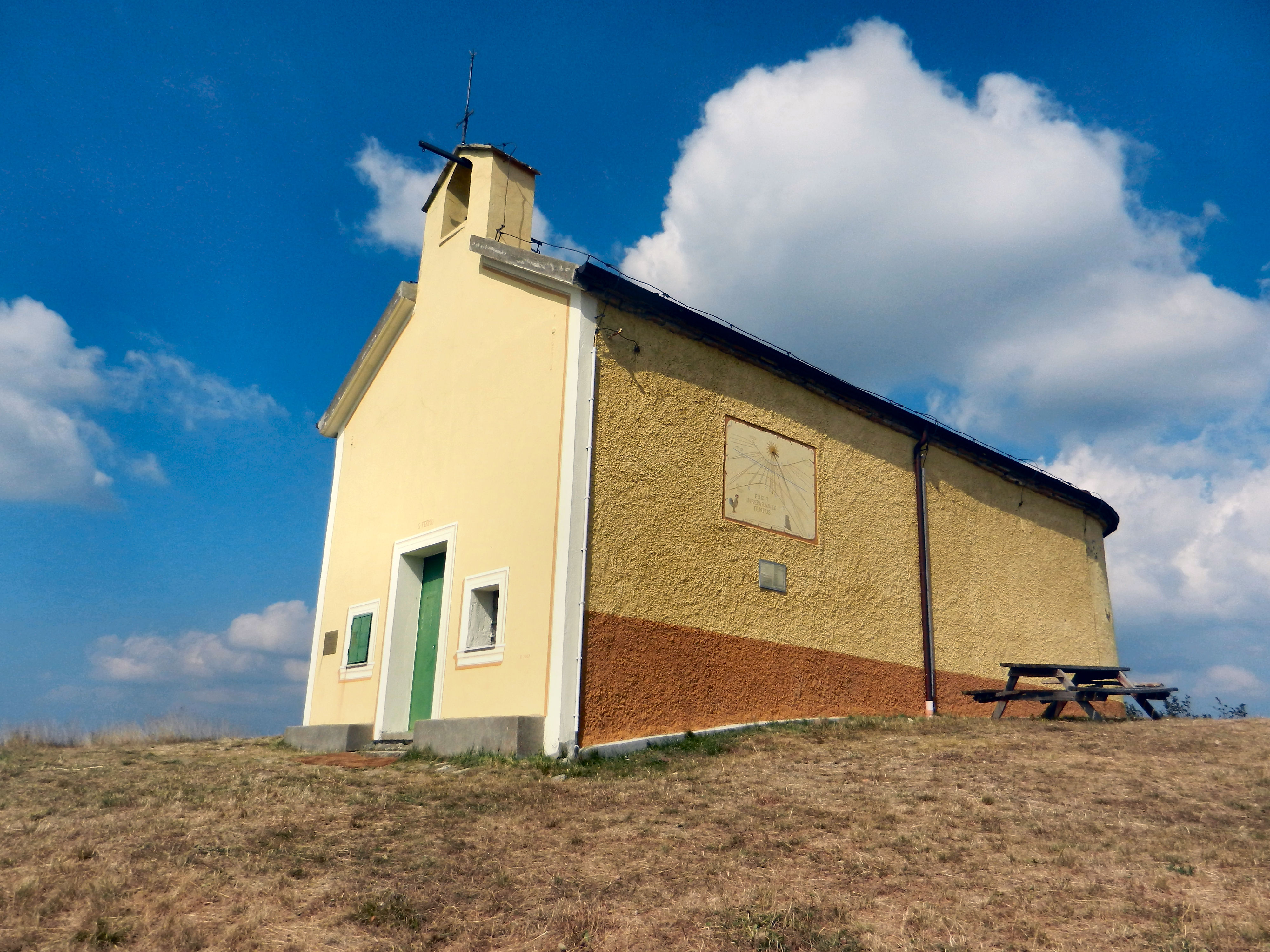 La cappella di San Fermo, sull'omonimo valico al confine tra Liguria e Piemonte